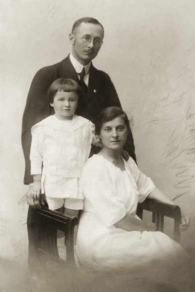 Wacław Maurycy Gajewski z żoną Leokadią Gajewską z d. Błońską i synem Wacławem